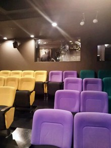 神奈川県横浜市西区にある映画館「シネマノヴェチェント」で使用されている客席